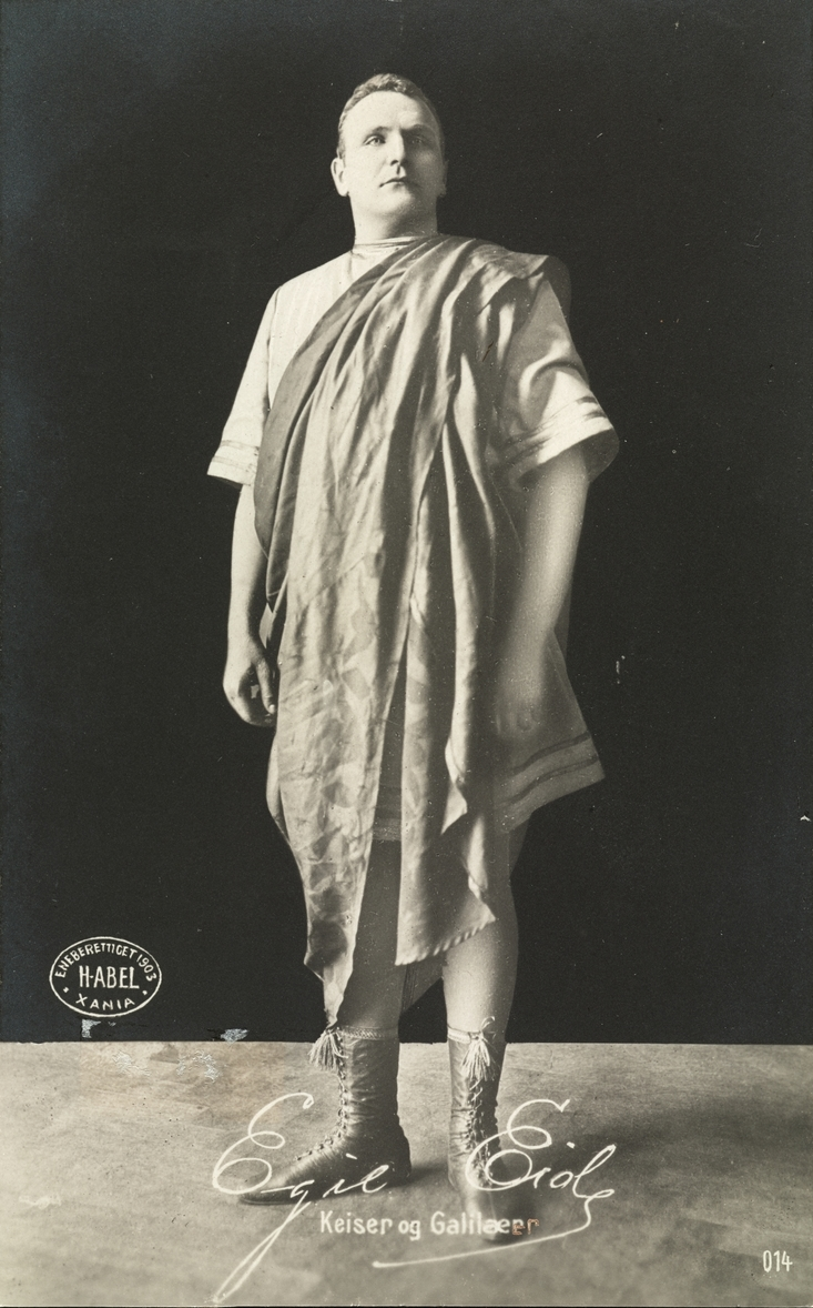 Egil Eide som Fyrst Julian i "Keiser og Galilæer" på Nationaltheatret, stående helfigur, kostyme.